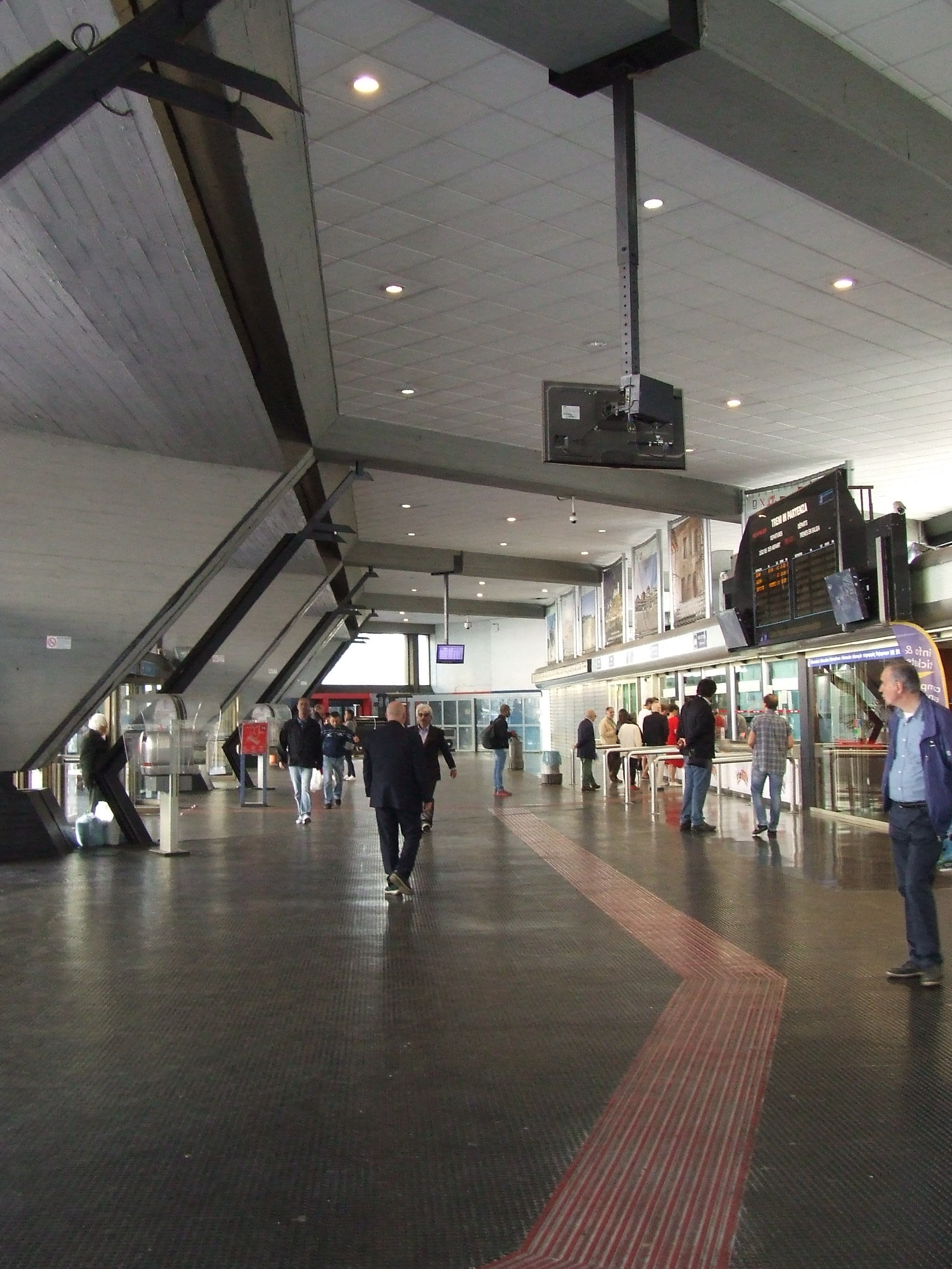 Stazione di Napoli Porta Nolana, stazione capotronco delle linee Vesuviane, ex Circumvesuviana, EAV - atrio